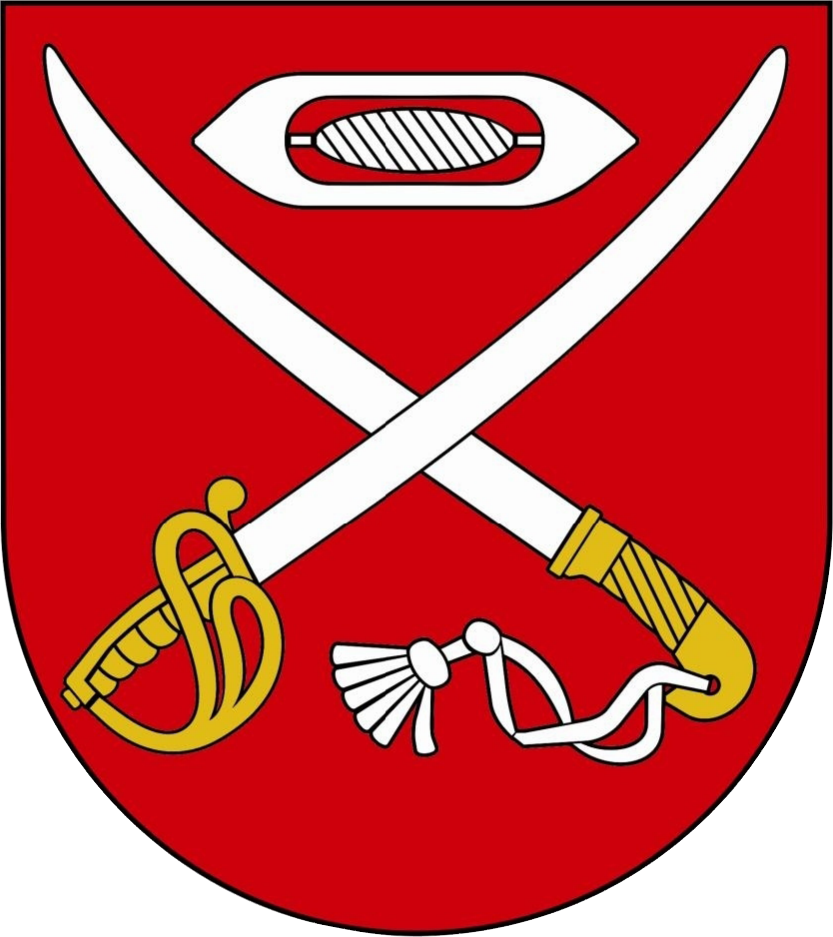 Herb gminy Cyców